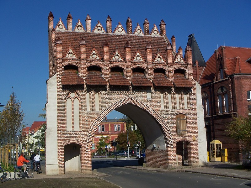 Kalensches Tor in Malchin, Stadtseite